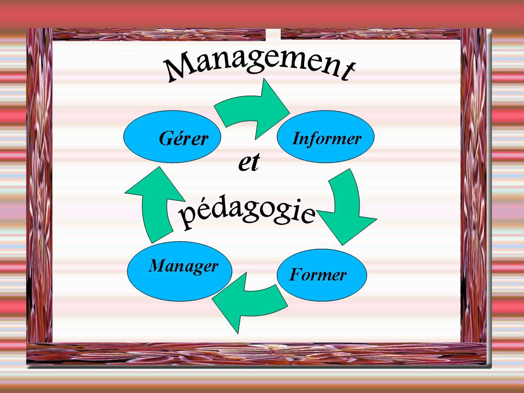 Management et pédagoggie